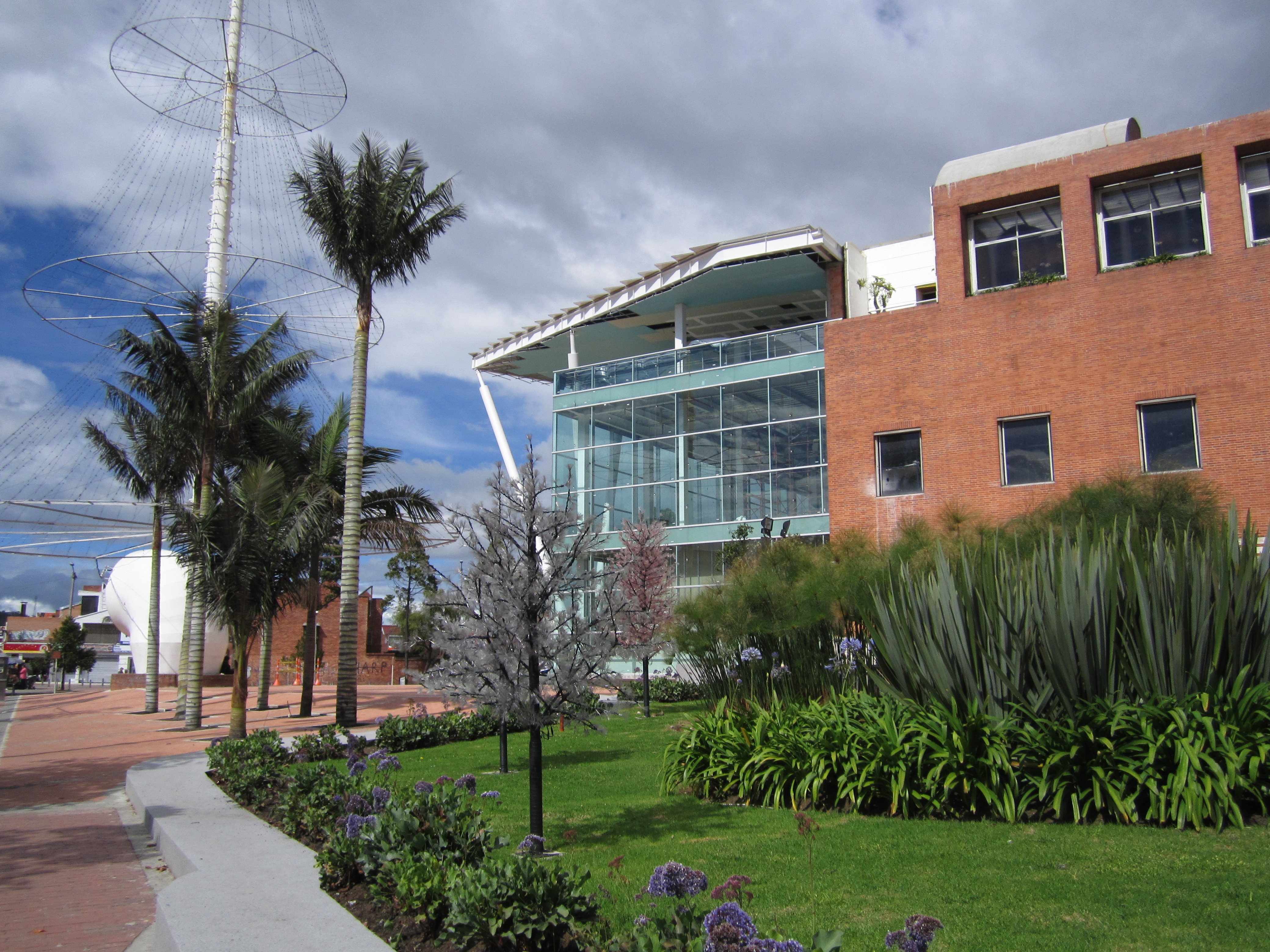 Entrada a Bulevar Niza por la kr 70 D con calle 127 D